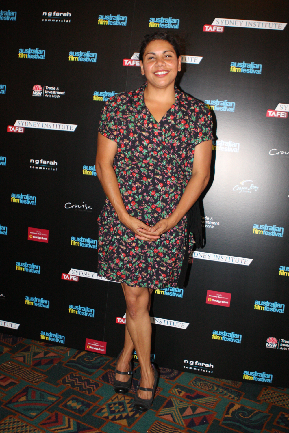 Deborah Mailman, Movie Walk Of Fame At Randwick Ritz; The Spot Festival